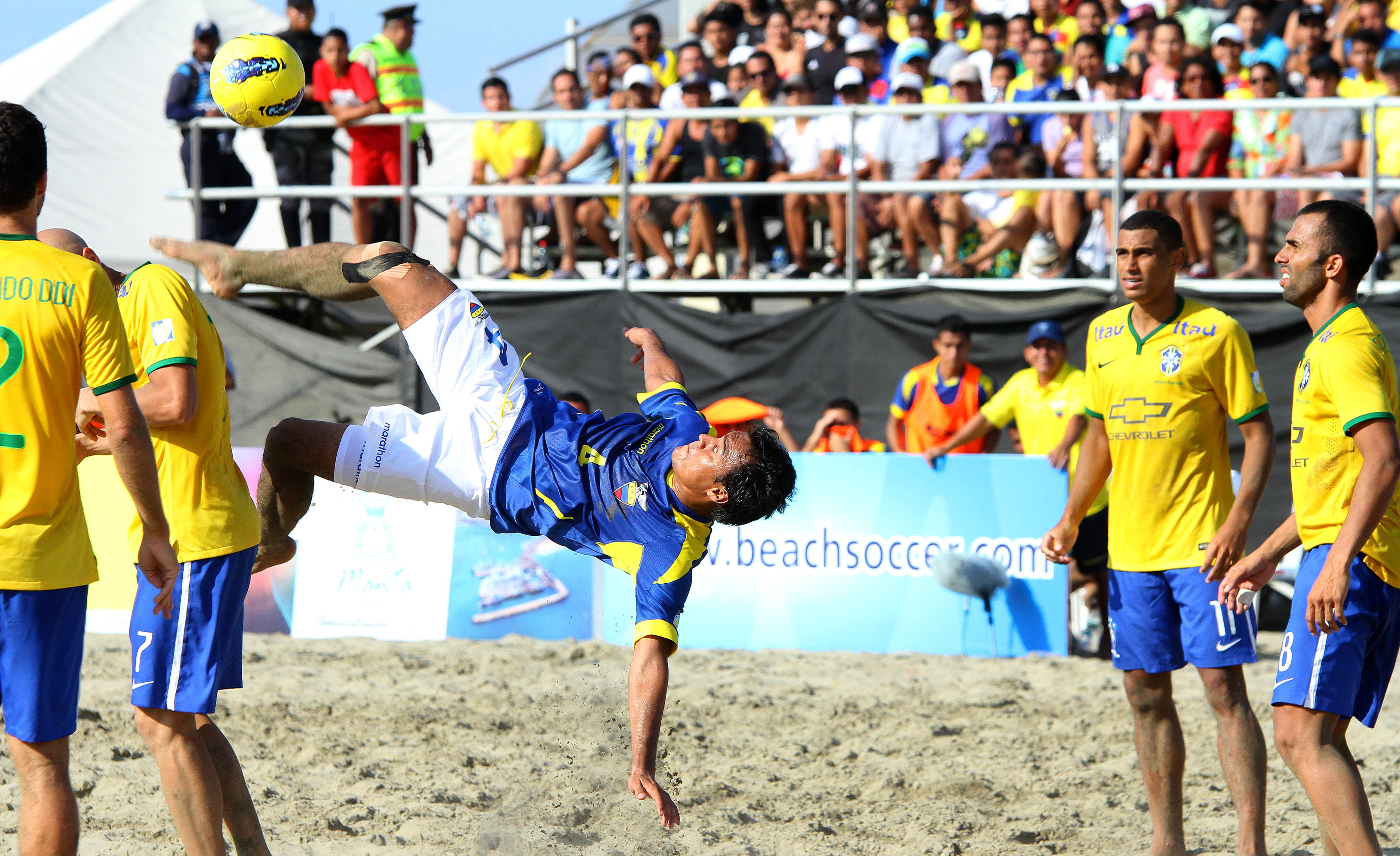 Manta, 25 de abr (Andes).Mario Alava de Ecuador remata de chilena ante la mirada de jugadores brasileños durante el partido de semifinal del Sudamericano de fútbol playa 2015 Foto:César Muñoz/Andes